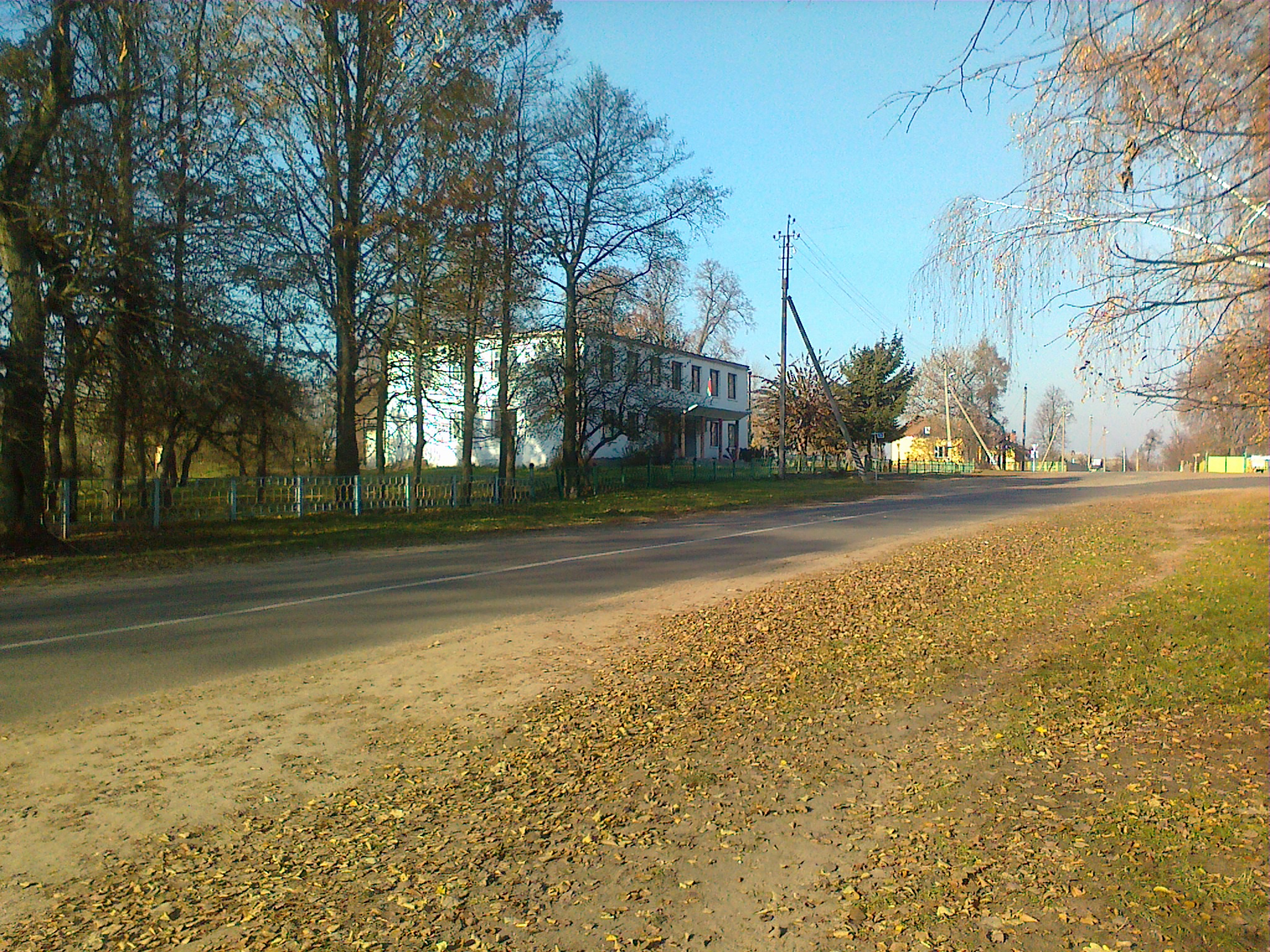 поселок Брожа Бобруйский район